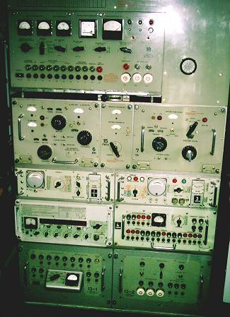 Nadajnik radiostacji jednowstęgowej UKF R-137B. Zasilanie: sieć trójfazowa 3x220V, moc pobierana: do 4 kW, moc w.cz. oddawana do anteny ≤ 800 W. W górnej części tablica rozdzielcza zasilania TRZ-18. Niżej wzmacniacz mocy WM-6, przełącznik wysokiej częstotliwości PWCz-15 i sprzęgacz antenowy SA-7. Pod nimi panele wzbudnika: panel poziomów W-2, panel rodzajów pracy W-1, syntezer 1-0M i zasilacz wzbudnika W-4. Najniżej zasilacze: niskich napięć wzmacniacza mocy i zasilacz wysokiego napięcia 1500/3000 V. Zdjęcie pochodzi ze strony